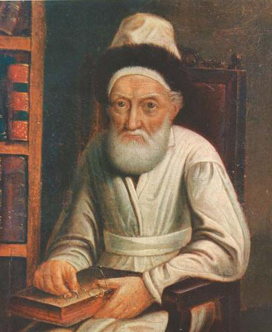 הצמח צדק. לפי שיפוצי חב"ד